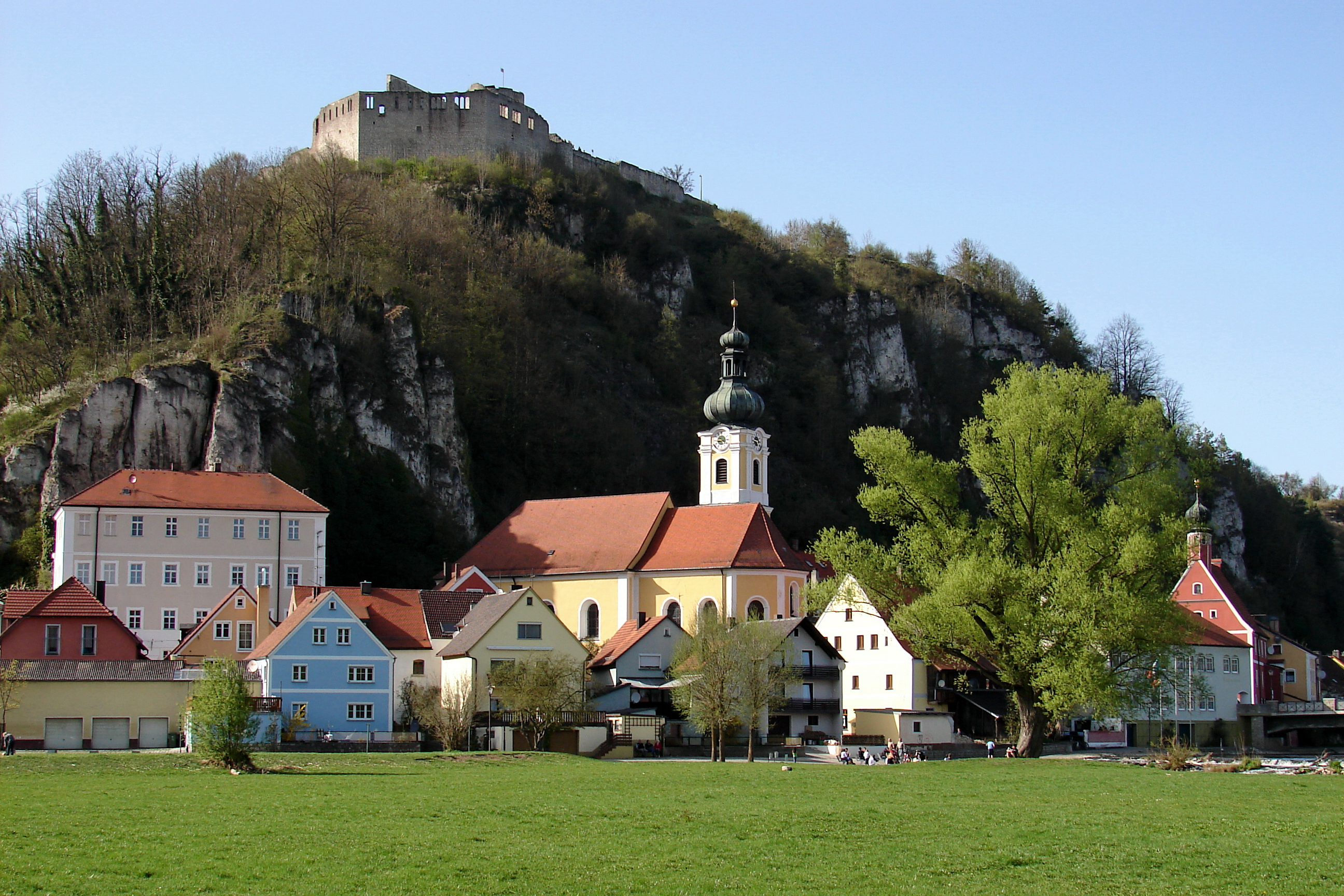 Kallmünz ist ein Markt im Oberpfälzer Landkreis Regensburg und Sitz der Verwaltungsgemeinschaft Kallmünz.